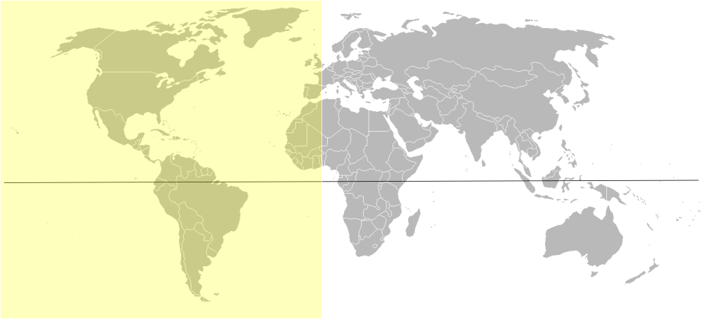 Baseado en